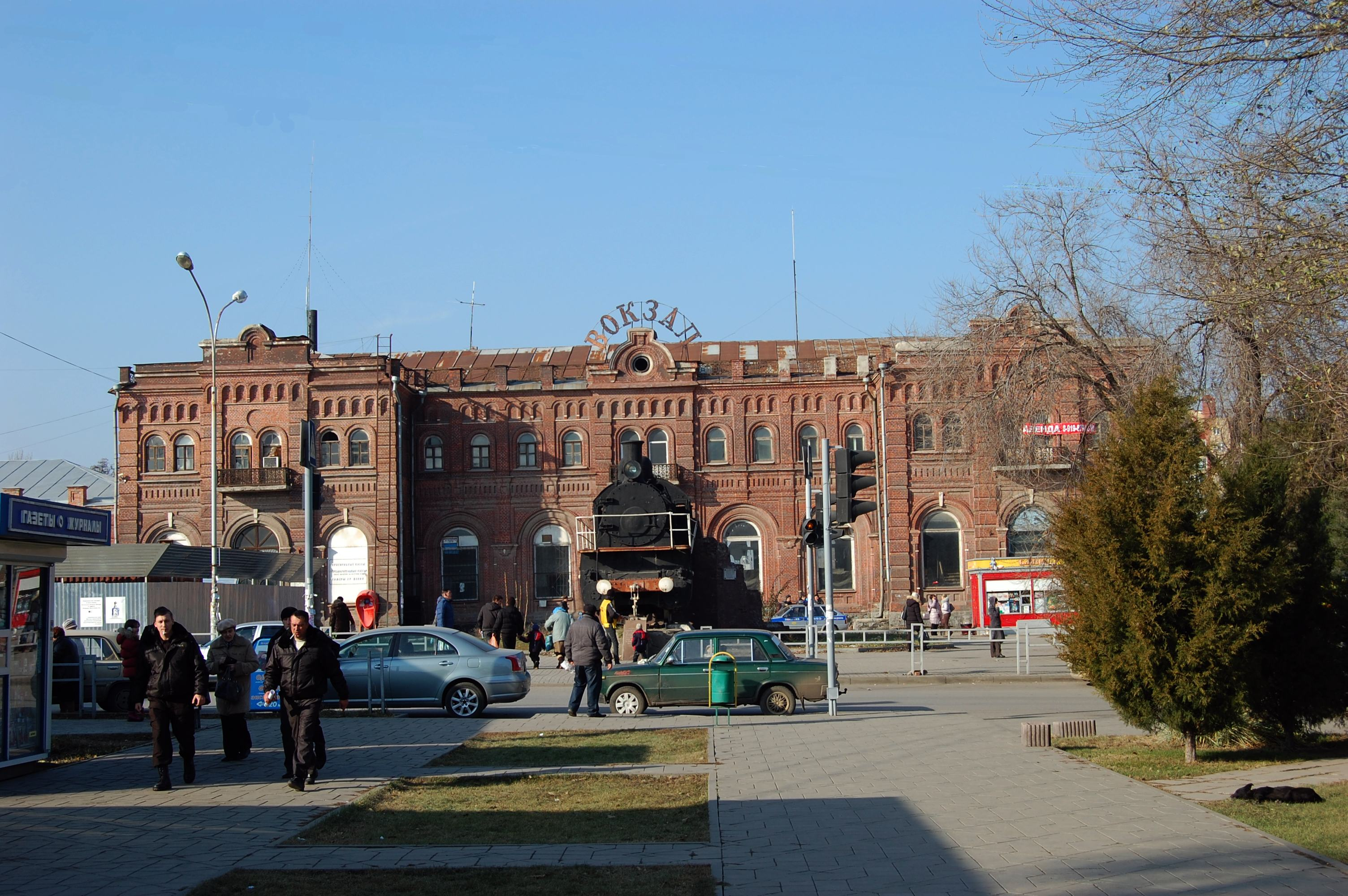 Таганрог, Площадь Восстания